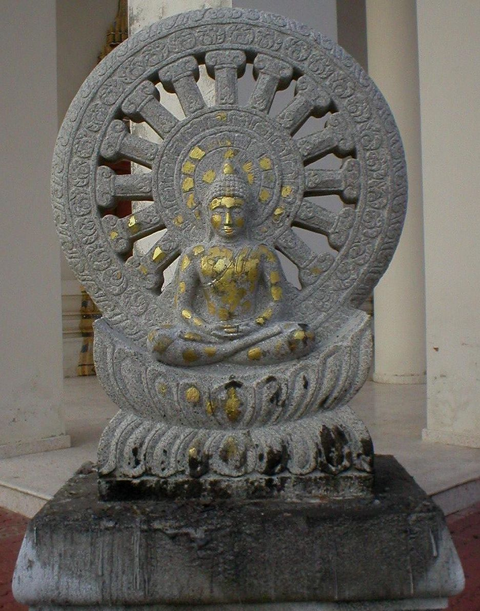 Roue du Dharma, époque moderne, hauteur sans socle environ 1 m. Naklua (Thaïlande) Prise de vue personnelle Siren 26 septembre 2005 à 18:26 (CEST)